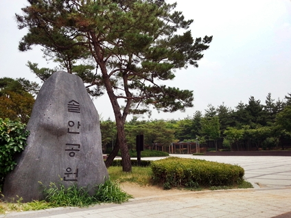 솔안공원. 경기 부천시 원미구 상동